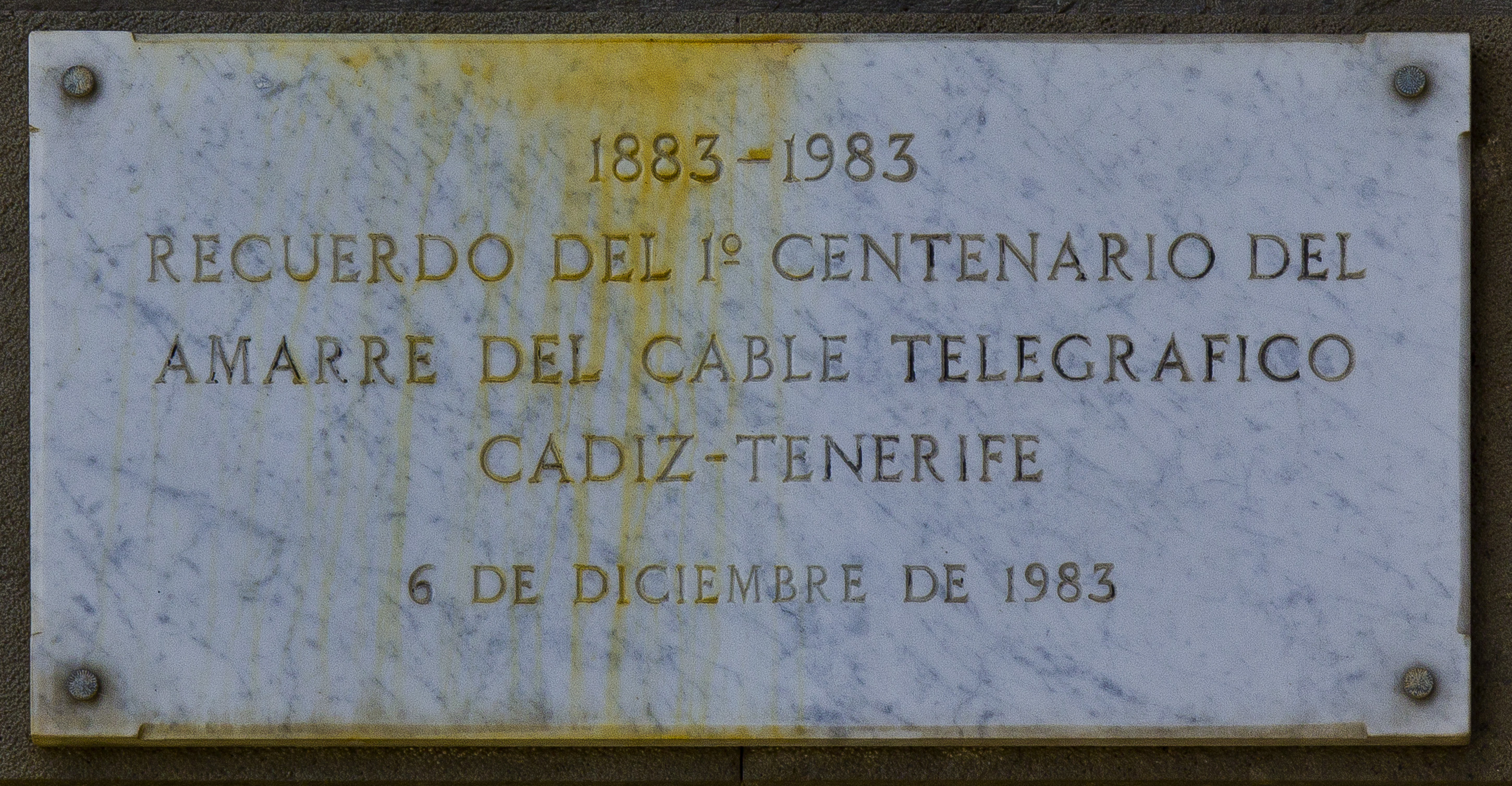 Gedenktafel am Gebäude der Post in Santa Cruz de Tenerife